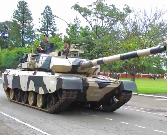 Vista del EE-T2